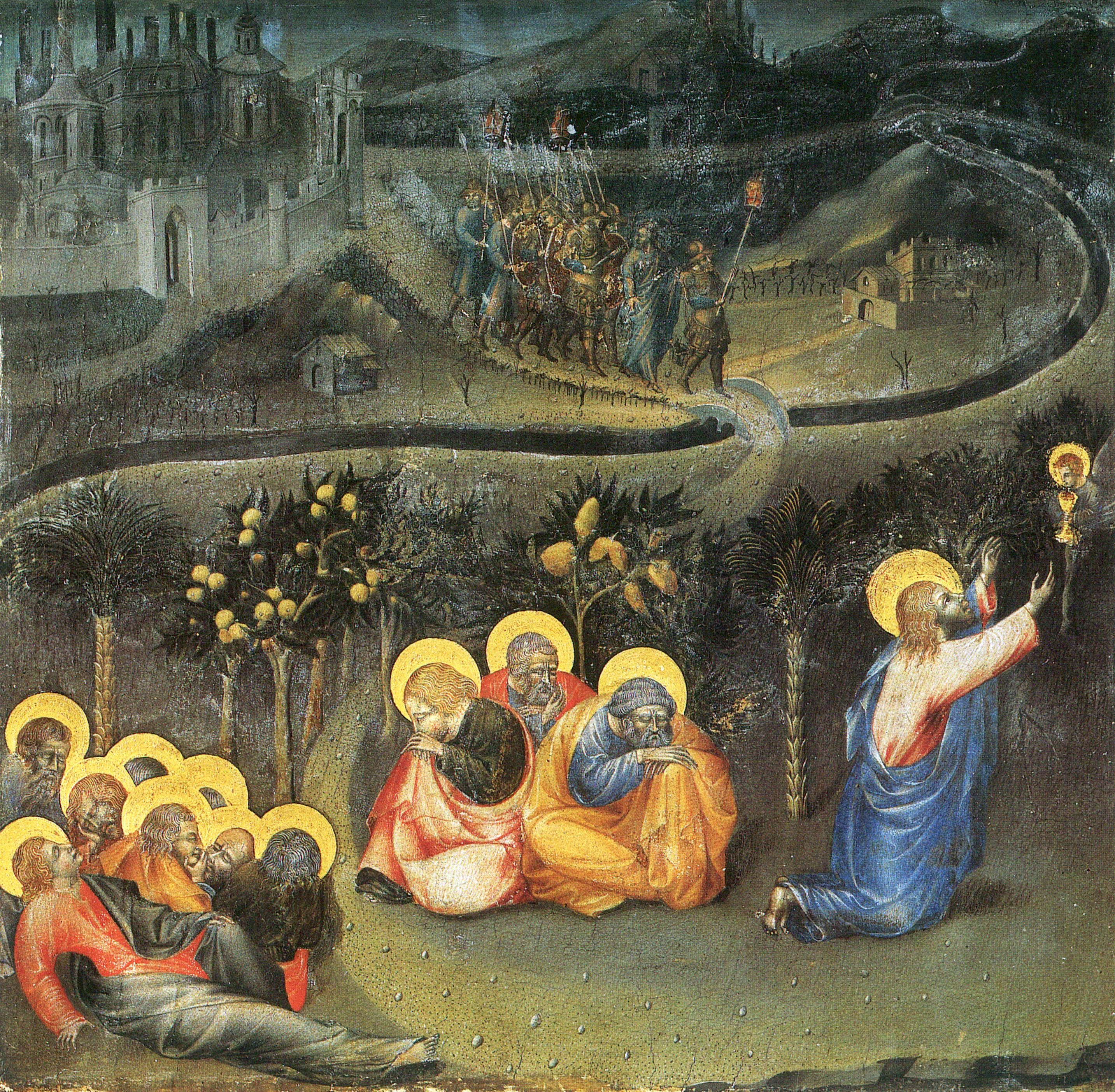 Christus im garten Gethsemane Giovanni di Paolo? Vatican Pinacoteca